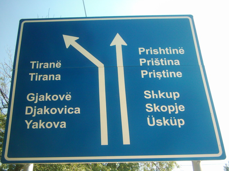 Kosova'da 3 ayrı dilde hazırlanmış yön levhası